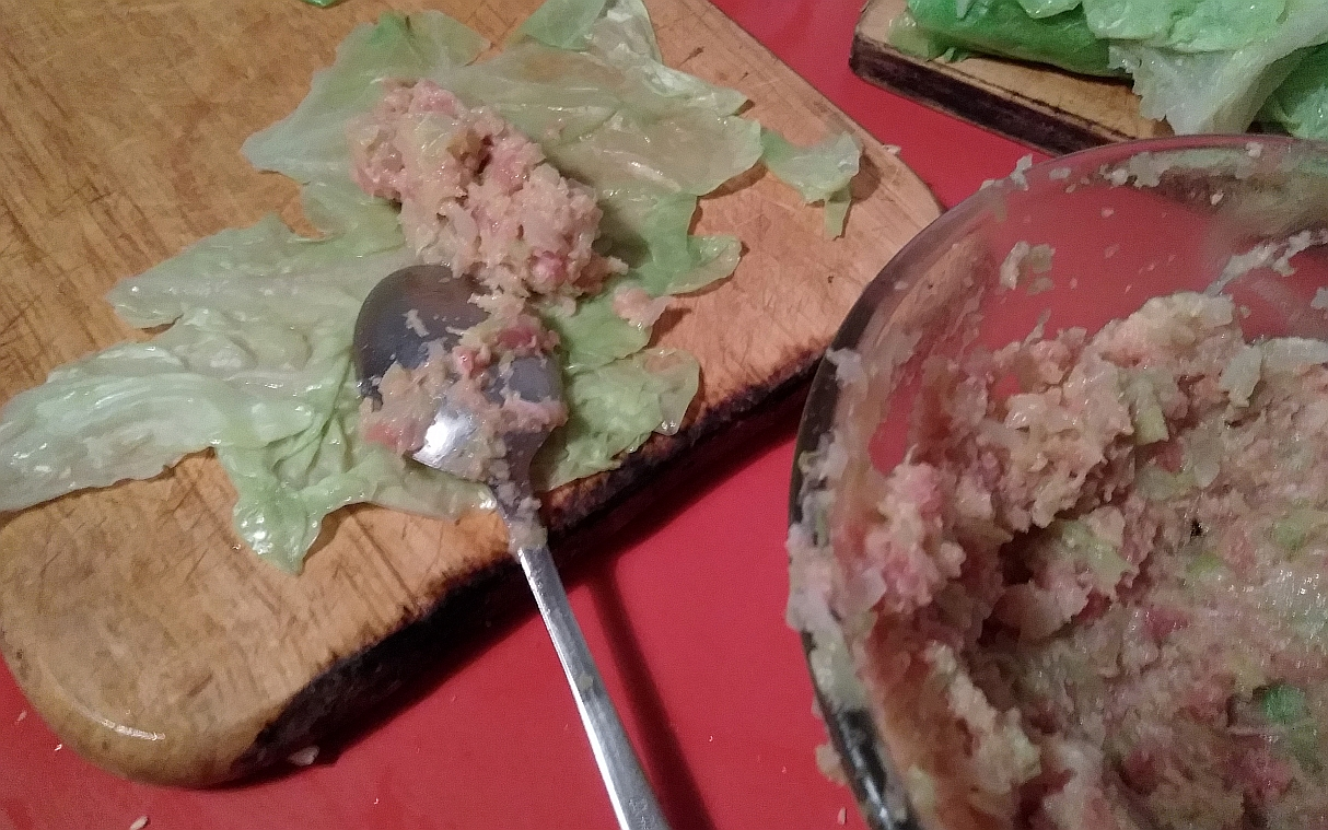 Farcitura delle foglie di verza nella preparazione dei caponet